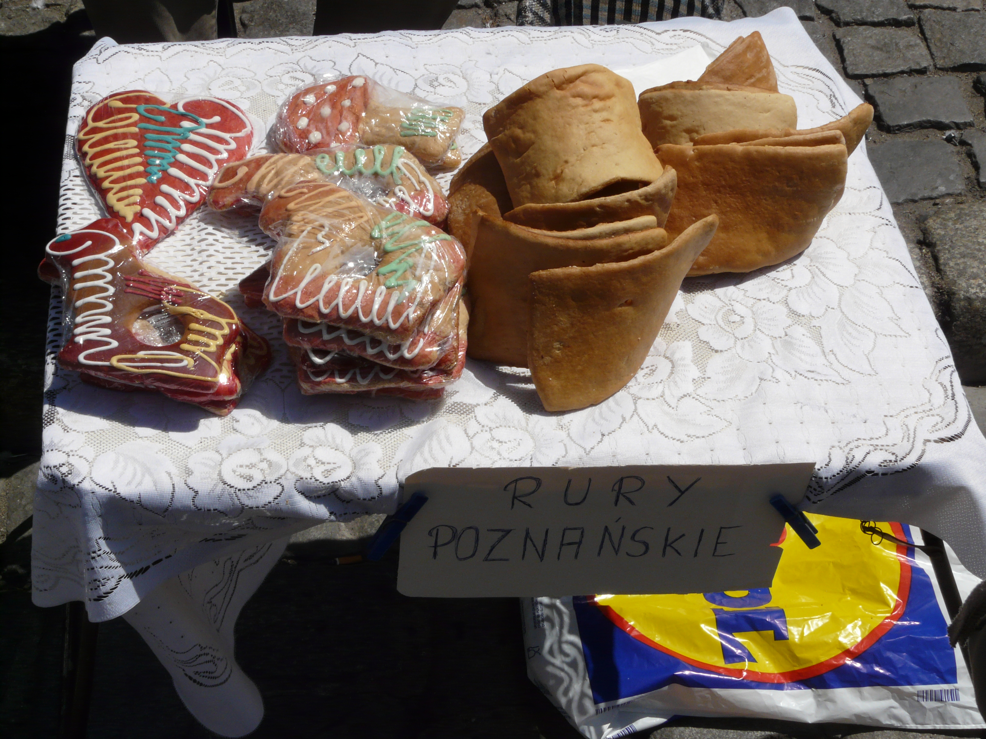 Poznań. Rury poznańskie